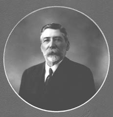 Pedro Ballester, fundador de Villa Ballester.